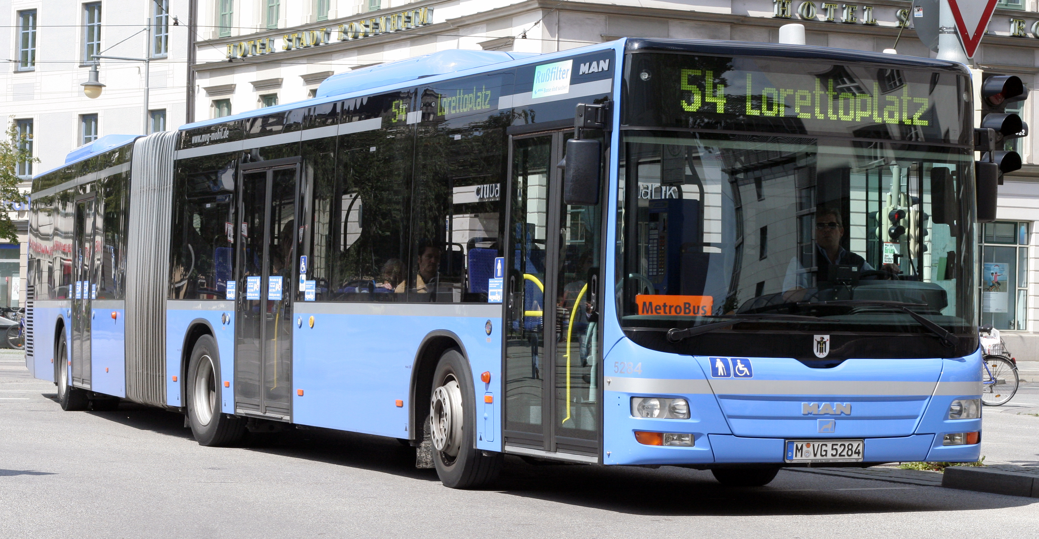 MVG 5284 in Munchen